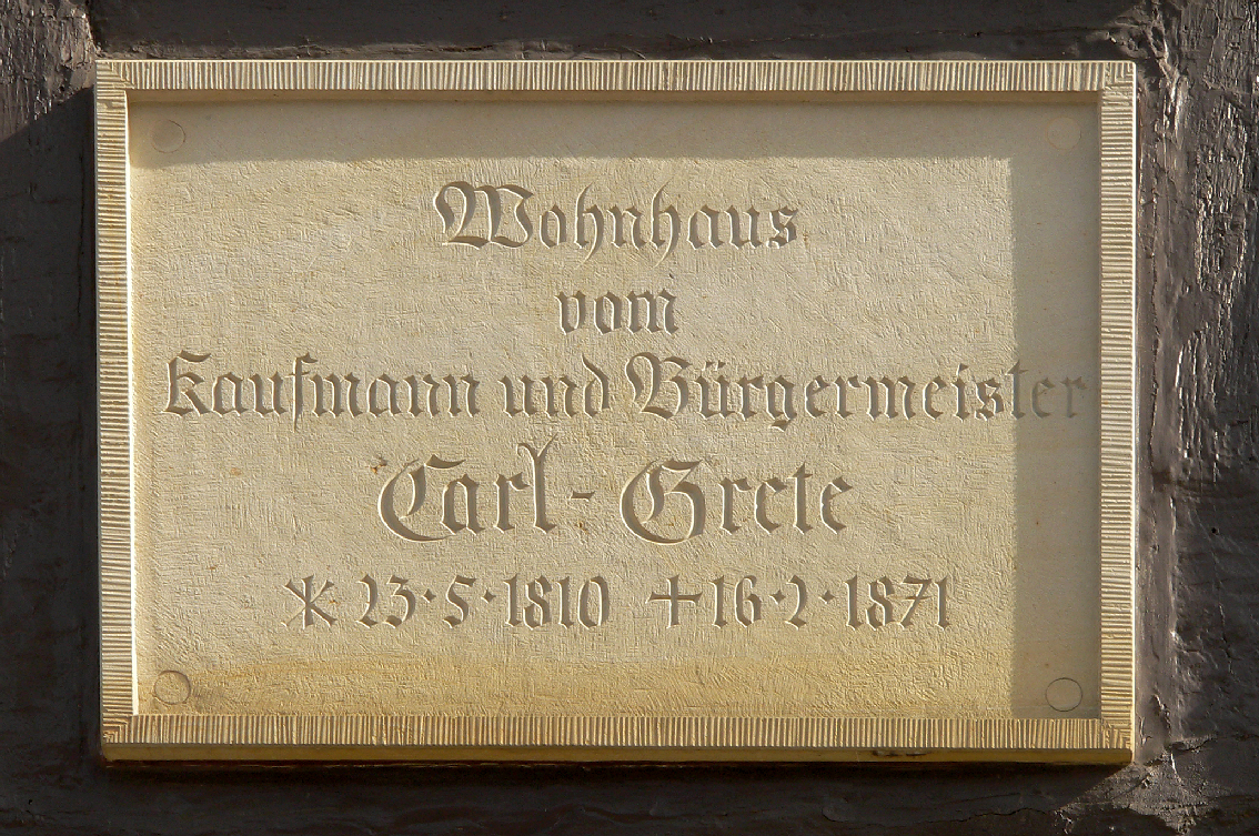 Vorsfelde, Langestrasse 36, Tafel am Gretehaus